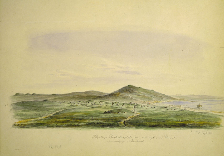 Akvarel af Magnus Petersen, 1 sept. 1880. Højstrup Bautastensplads set mod syd. Tømmerby sogn Vester Hanherred, Thisted Amt.